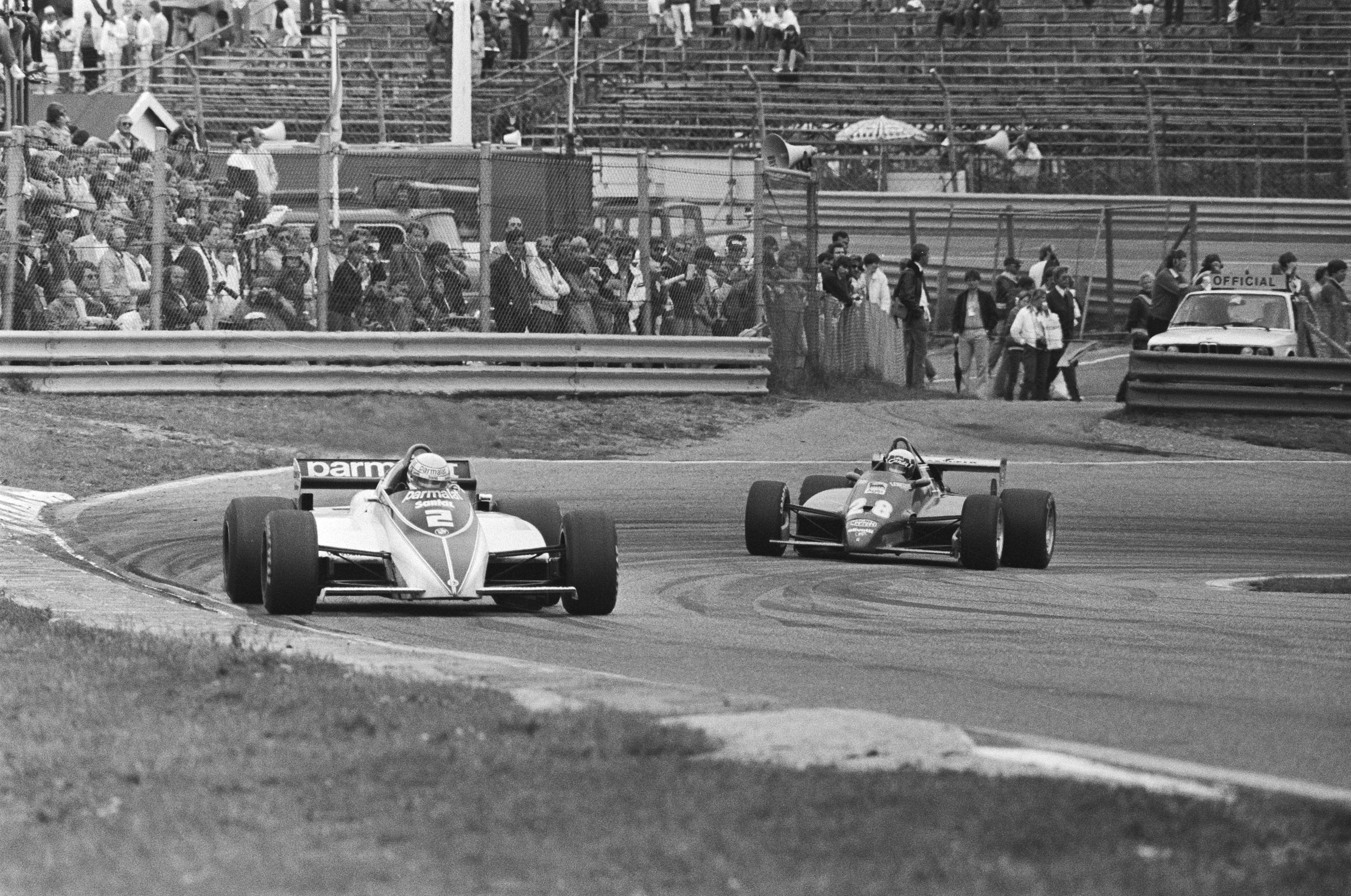 Collectie / Archief : Fotocollectie Anefo Reportage / Serie : [ onbekend ] Beschrijving : Grand Prix van Nederland te Zandvoort; no. 2 Riccardo Patrese, no. 28 Didier Pironi in aktie Datum : 3 juli 1982 Locatie : Noord-Holland, Zandvoort Trefwoorden : autoraces Persoonsnaam : Riccardo Patrese, Didier Pironi, grand Prix van Nederland Fotograaf : Dijk, Hans van / Anefo Auteursrechthebbende : Nationaal Archief Materiaalsoort : Negatief (zwart/wit) Nummer archiefinventaris : bekijk toegang 2.24.01.05 Bestanddeelnummer : 932-2347